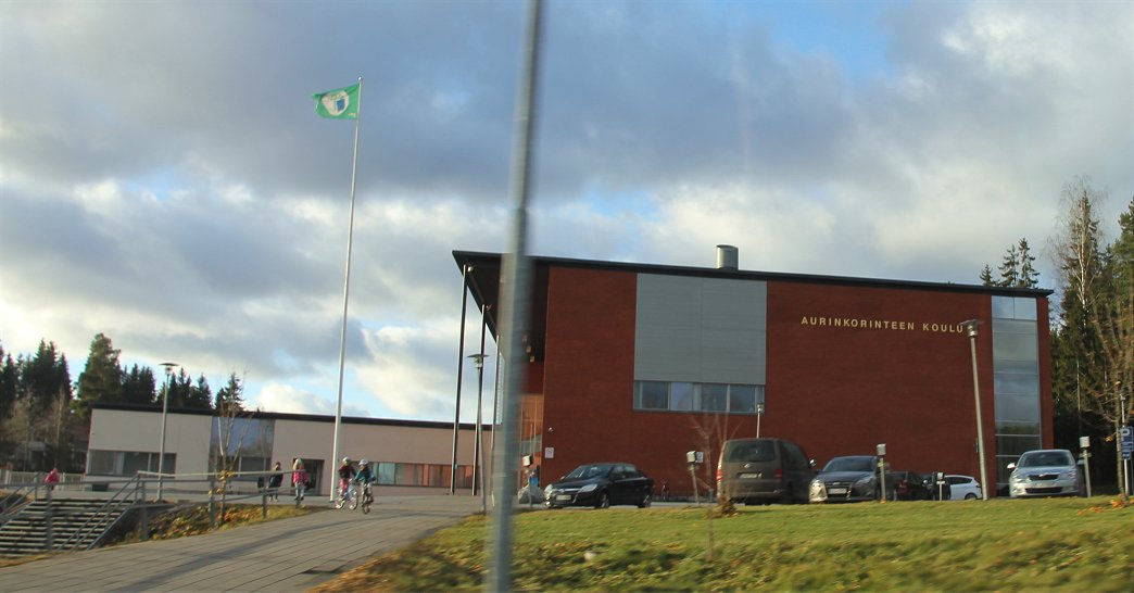 Aurinkorinteen koulu on Kuopion Pirtin kaupunginosassa toimiva suomenkielinen alakoulu (luokka-asteet 1–6).